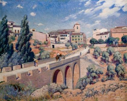 Pintura a l'oli sobre tela. Marc de fusta amb dues sanefes vegetals motllurades.